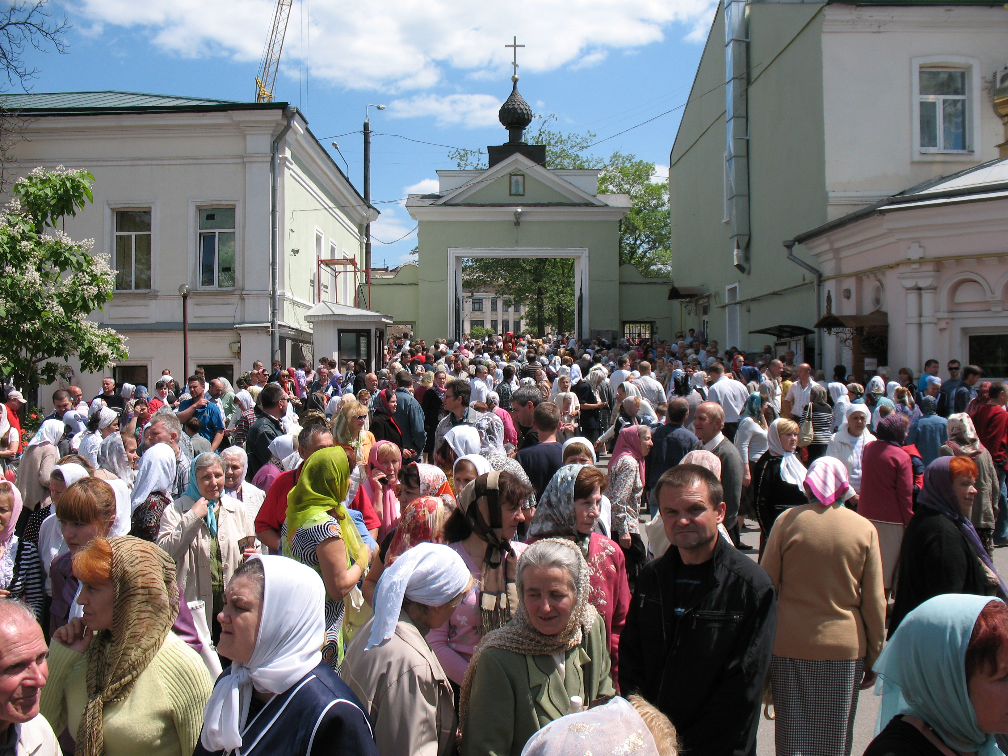 После крестного хода 27 мая 2012 года в честь 20-летия Харьковского собора в Покровском монастыре. Православные миряне.